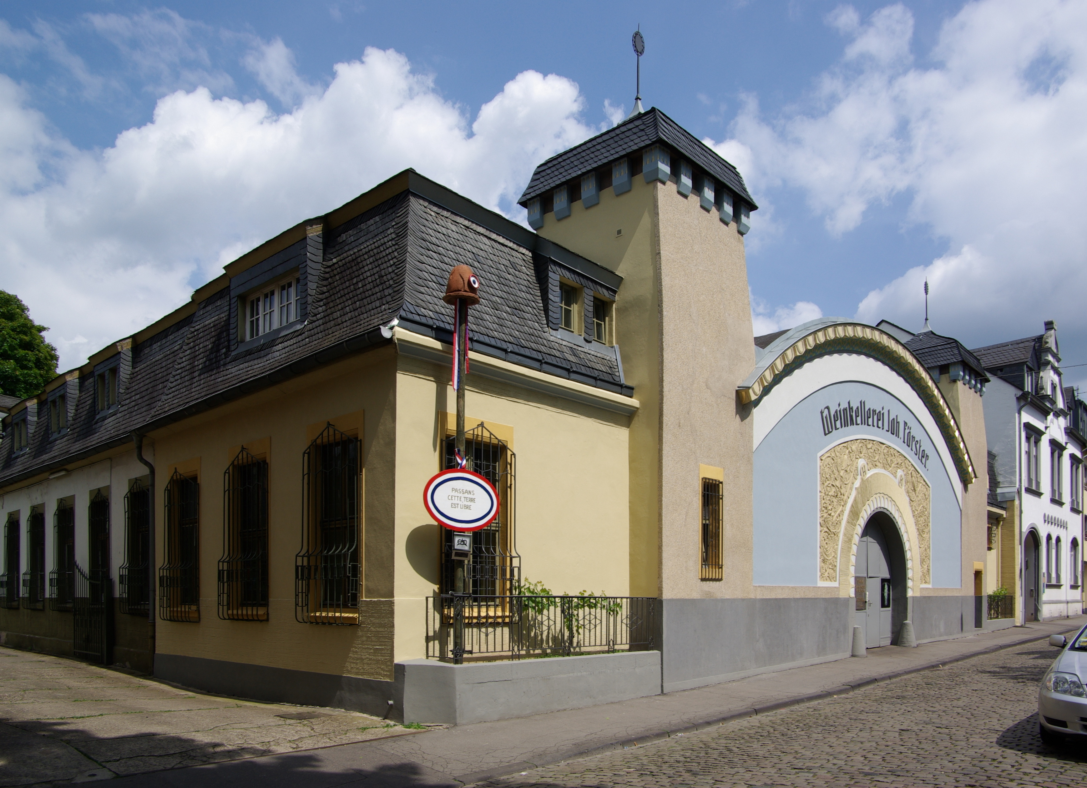 Trier,Gilbertstraße 34: Weinkellerei Johann Förster; Eisenbetonbau, dreischiffige Halle über zweigeschossigem Keller, Mittelschiff von Türmen flankiert, Seitenschiffe mit Mansarddächern, florale Jugendstidekoration, 1905, Architekt C. Sieben, Aachen, mit Freiheitsbaum